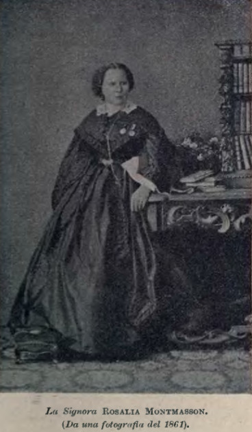 Foto del 1867 di Rosalia Montmasson, moglie di Francesco Crispi.